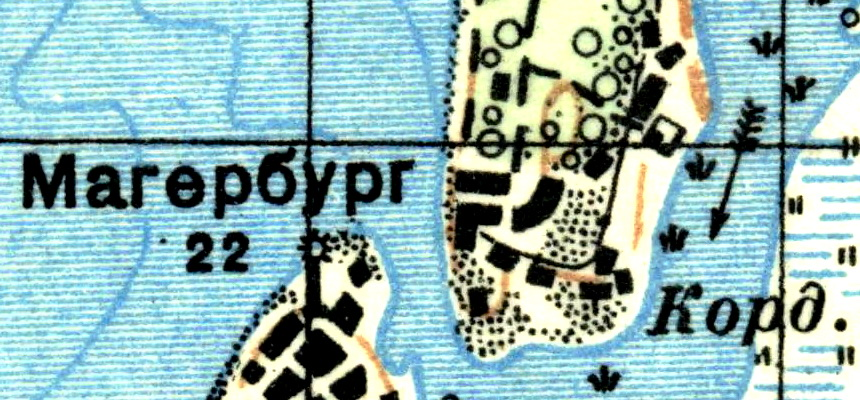 Топографическая карта Ленинградской области, квадрат О-35-21-В (Нарва), деревня Магербург